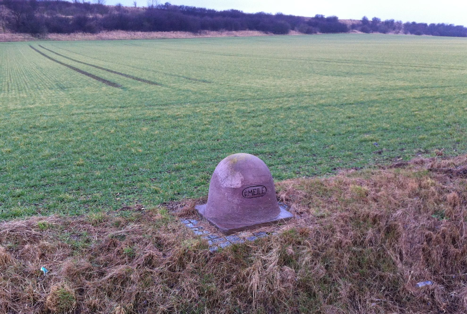 Preußischer Viertelmeilenstein an der Bundesstraße 80 in der Nähe von Seeburg. Früher verlief hier die Kunststraße von Langenbogen über Eisleben und Sangerhausen nach Nordhausen.